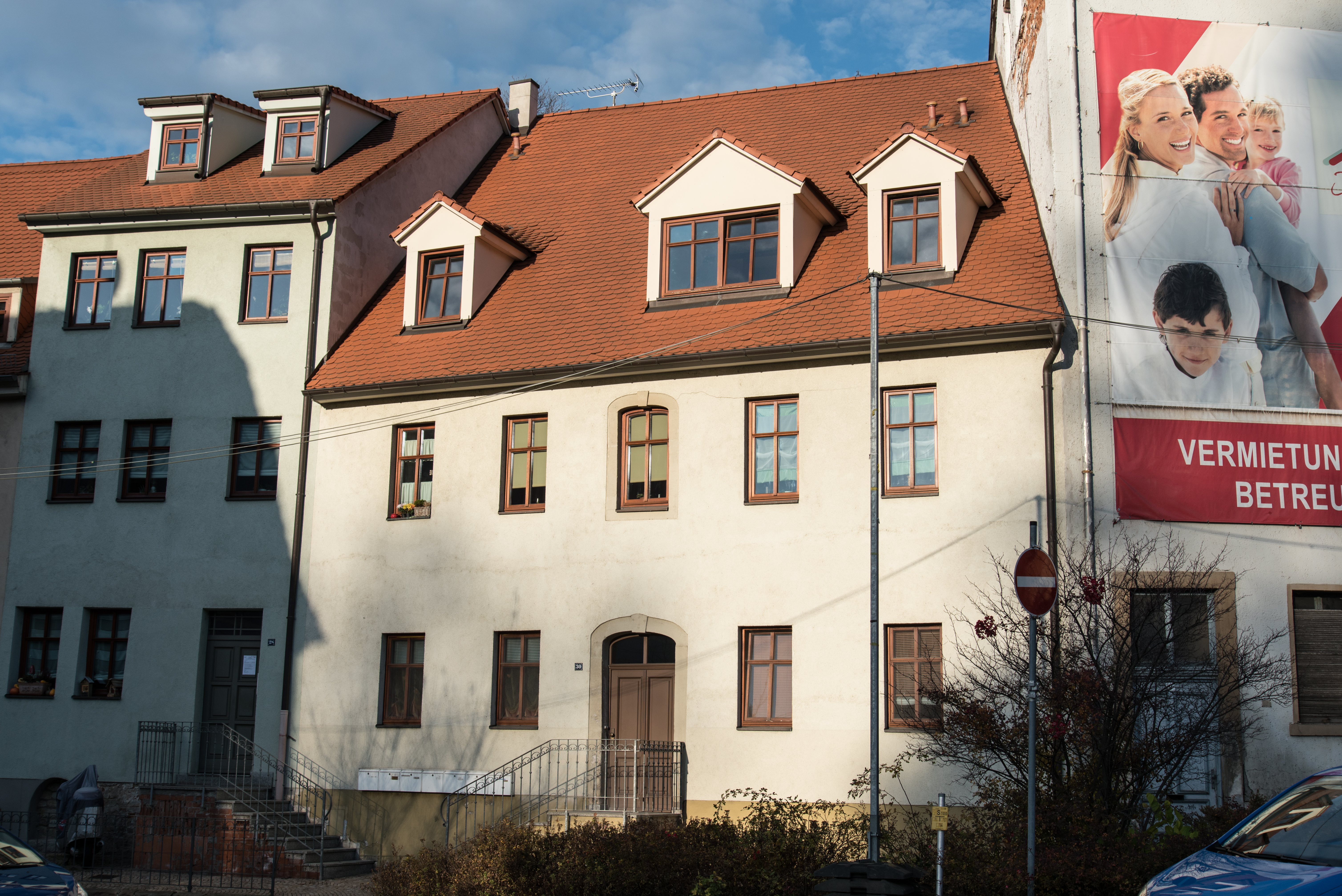 Weißenfels, Große Burgstraße 30